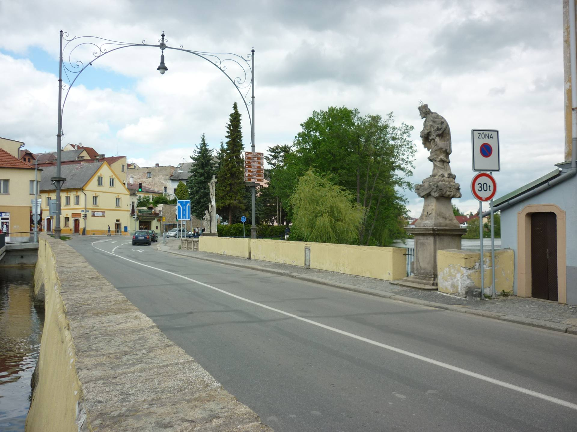 Most mezi Velkým a Malým Vajgarem. Těmito rybníky protéká Hamerský potok, který pod Malým Vajgarem vtéká do Nežárky.